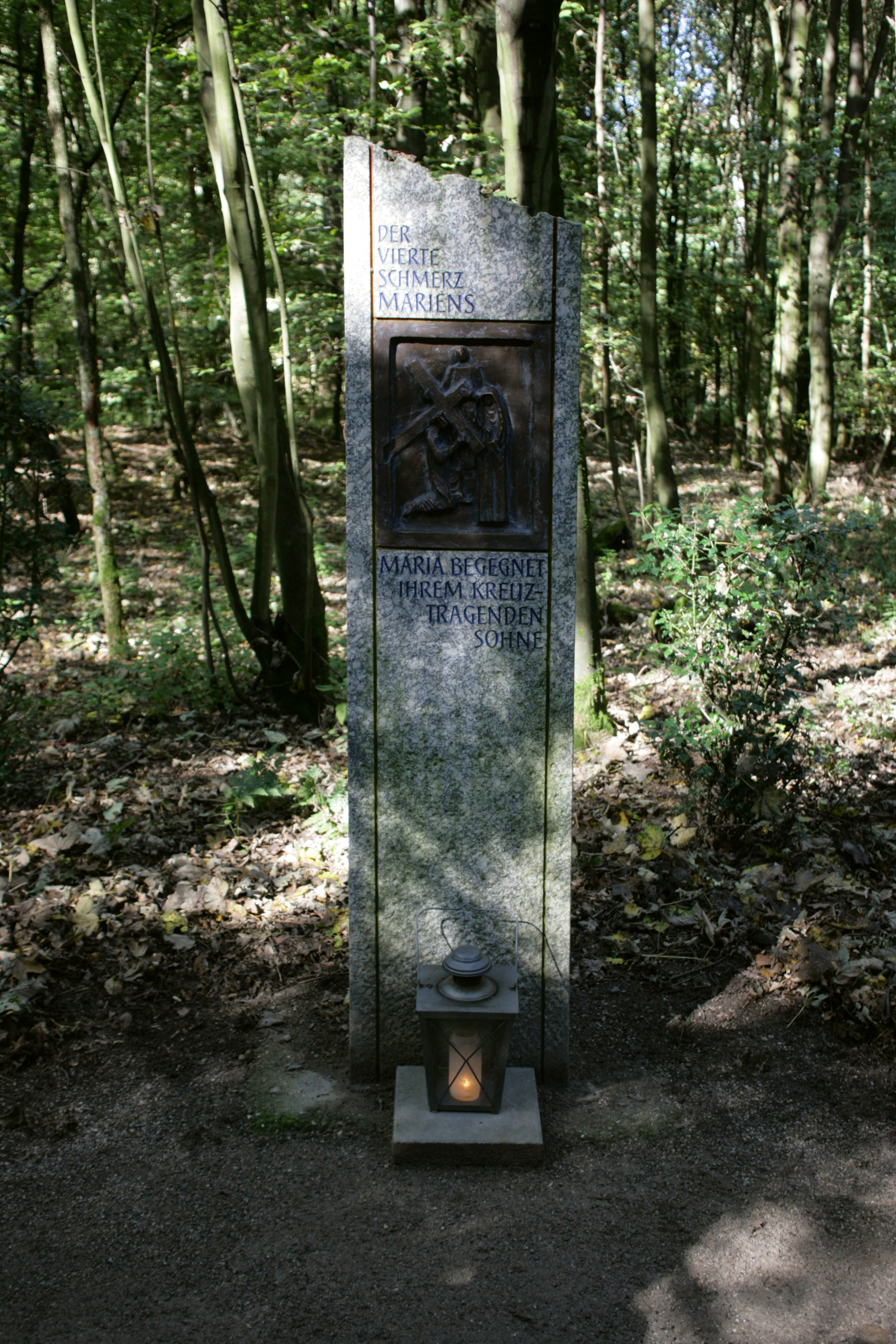 Via Matris an der Sieben-Schmerzen-Kapelle in Gelsenkirchen-Buer